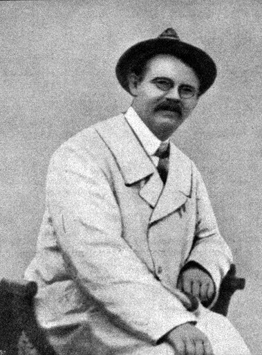 Harold Bolingbroke Mudie, brita esperantisto